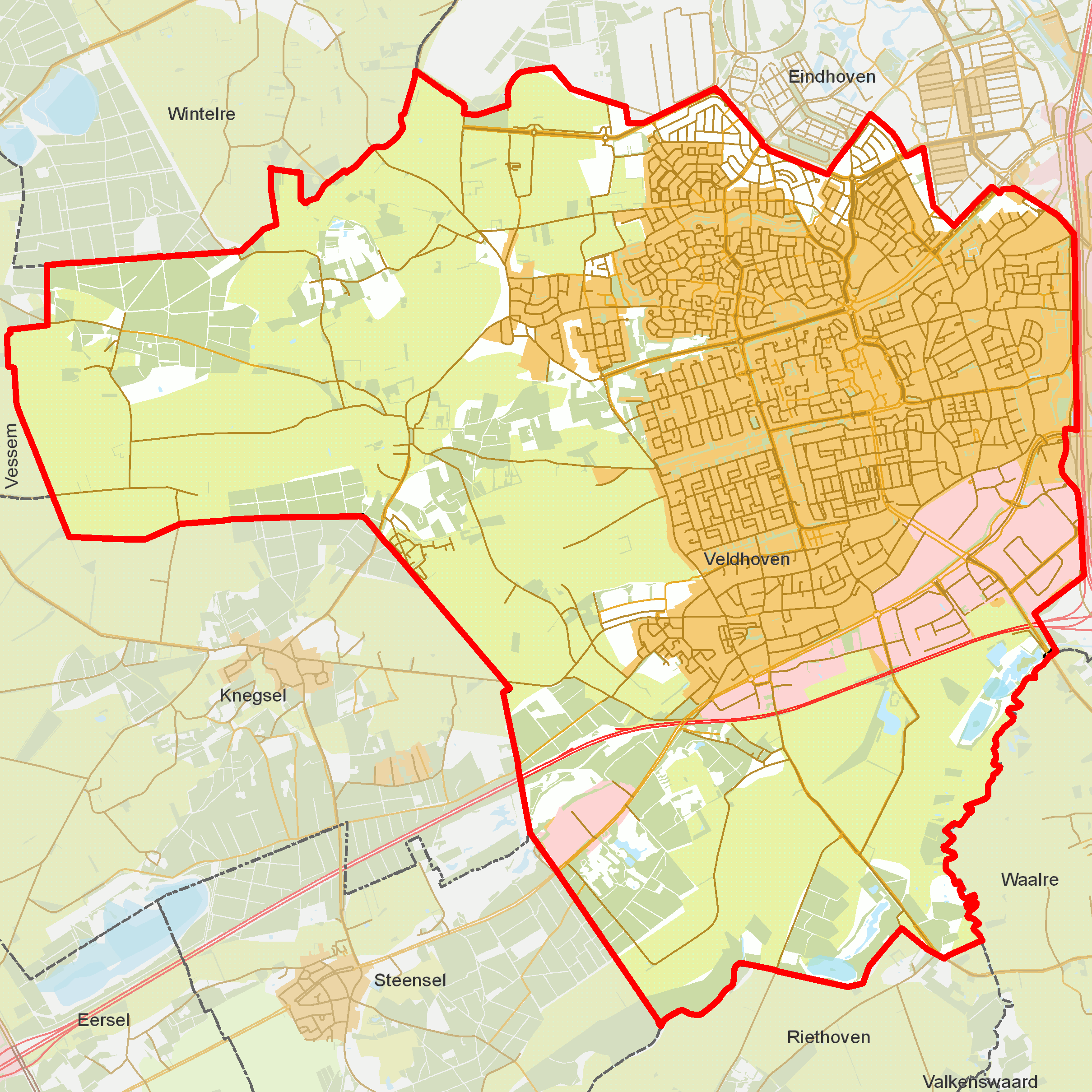 BAG woonplaatsen - Gemeente Veldhoven.png